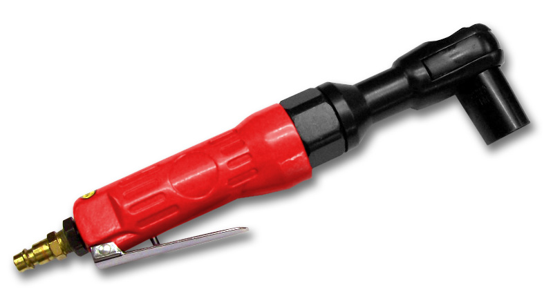 Druckluftbetriebene Ratsche